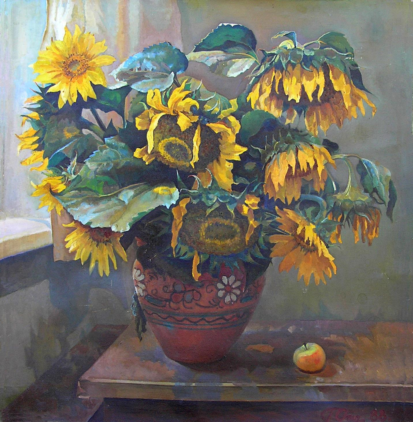 Подсолнухи, 1988.